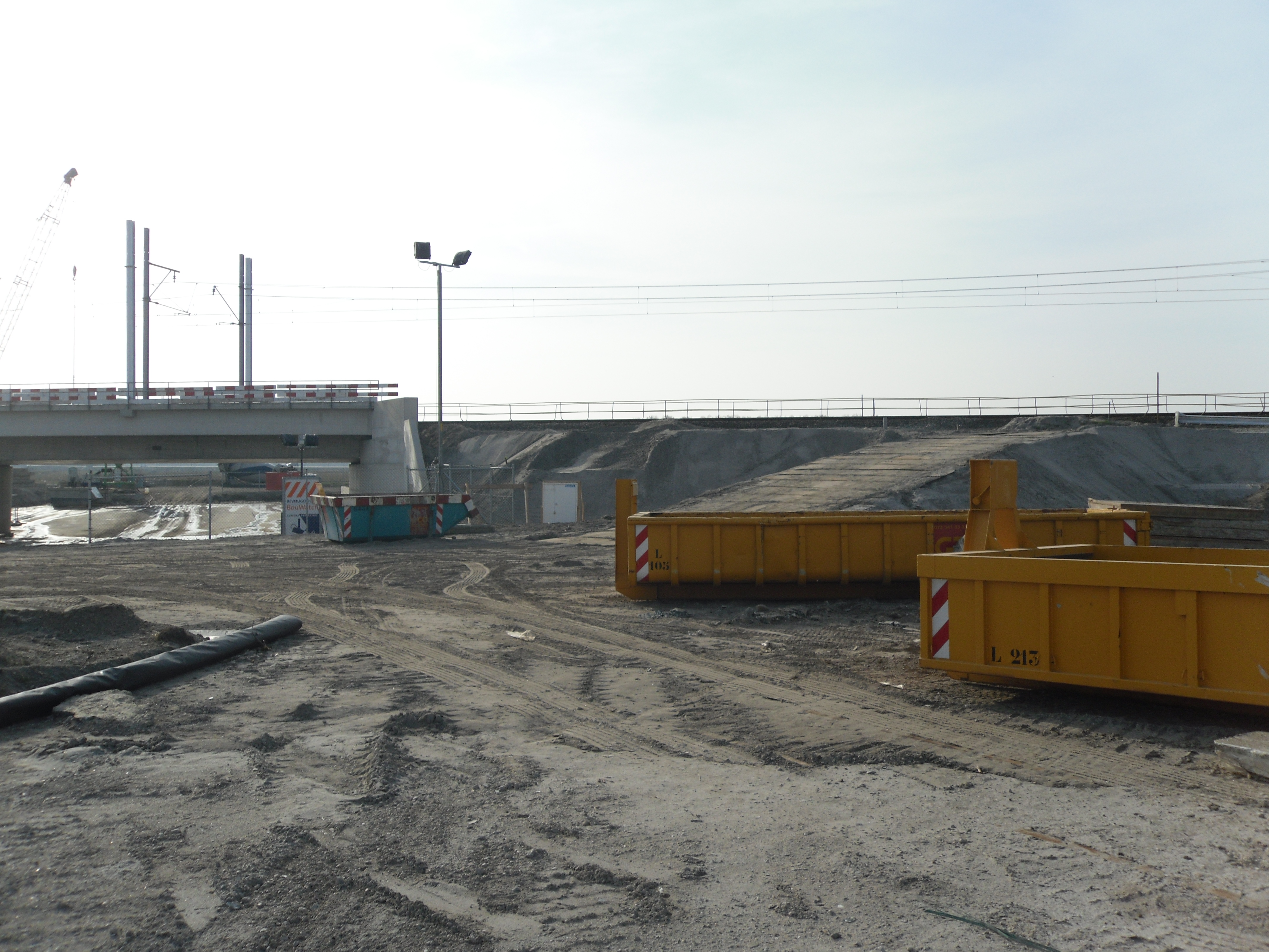 Foto van de bouw van het toekomstige station in Almere.